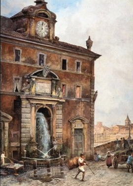 Fontana di Ponte Sisto a Via Giulia in Rome (rione Regola). La fontana, detta Fontanone dei cento preti perché addossata in origine ad un ospizio per vecchi preti, fu spostata per la costruzione dei muraglioni del Tevere, e ricostruita all'altra testata di Ponte Sisto, dove ancor oggi si trova.